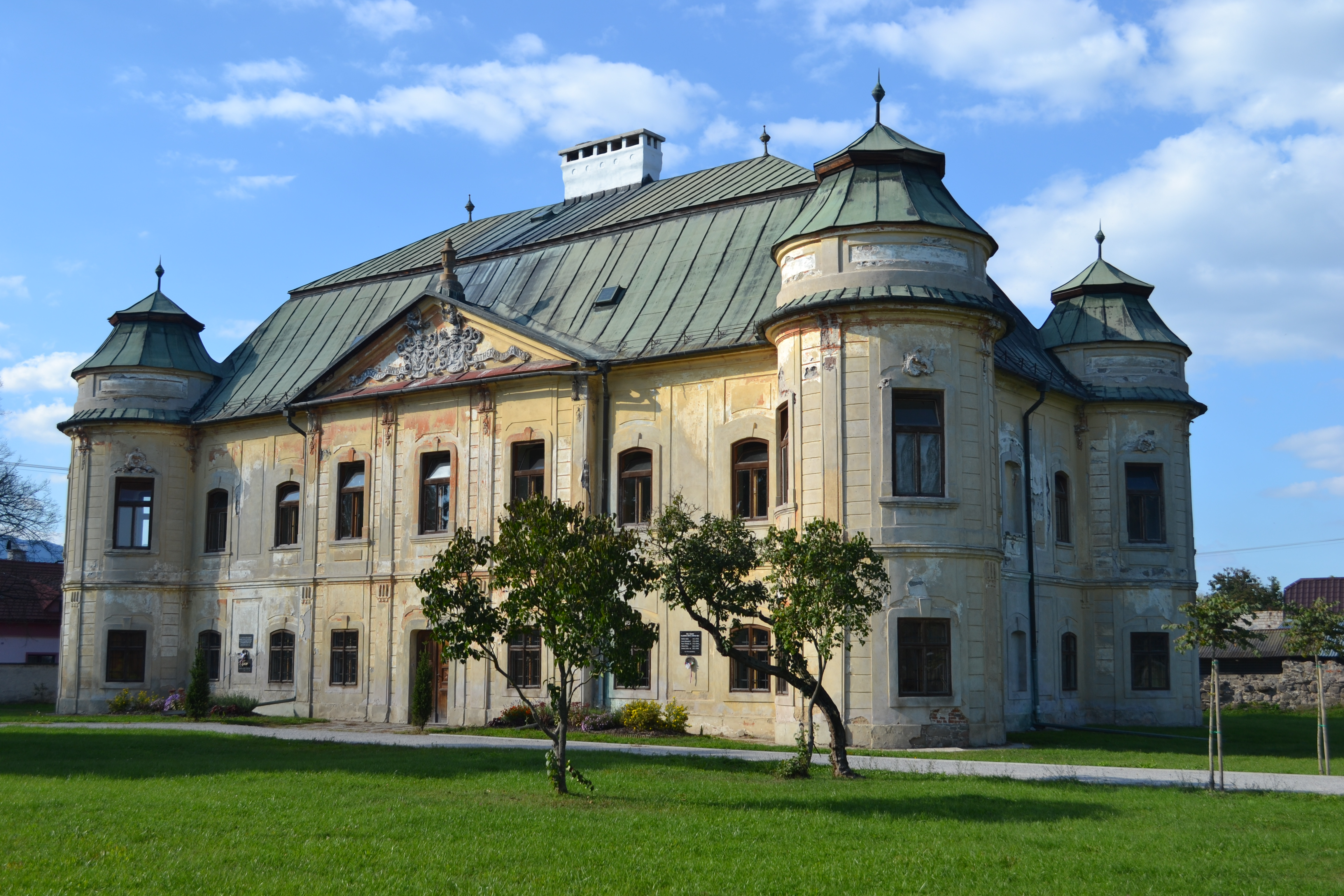 Barokový kaštieľ s mohutnými nárožnými baštami v Hronseku